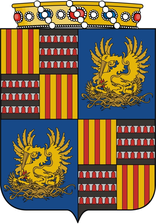 Esquartelado: I e IV - Ribeiro: esquartelado: 1 e 4 - de ouro com quatro palas de vermelho; 2 e 3 - de negro, com três faixas veiradas de prata e vermelho; II e III - Gomes: de azul, com um pelicano de ouro, no seu ninho alimentando as suas crias com seu sangue.